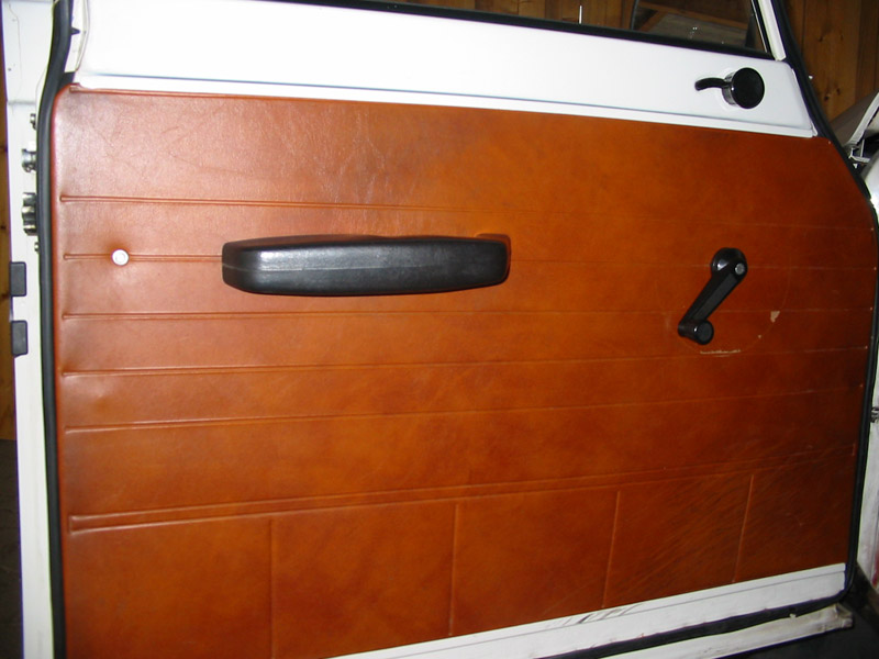 Türinnenseite eines Wartburg 1.3 Tourist, Baujahr 1989 oder Anfang 1990: Der Bezug besteht bereits aus braunem Kunstleder, es ist jedoch noch der alte 353er Griff verbaut.